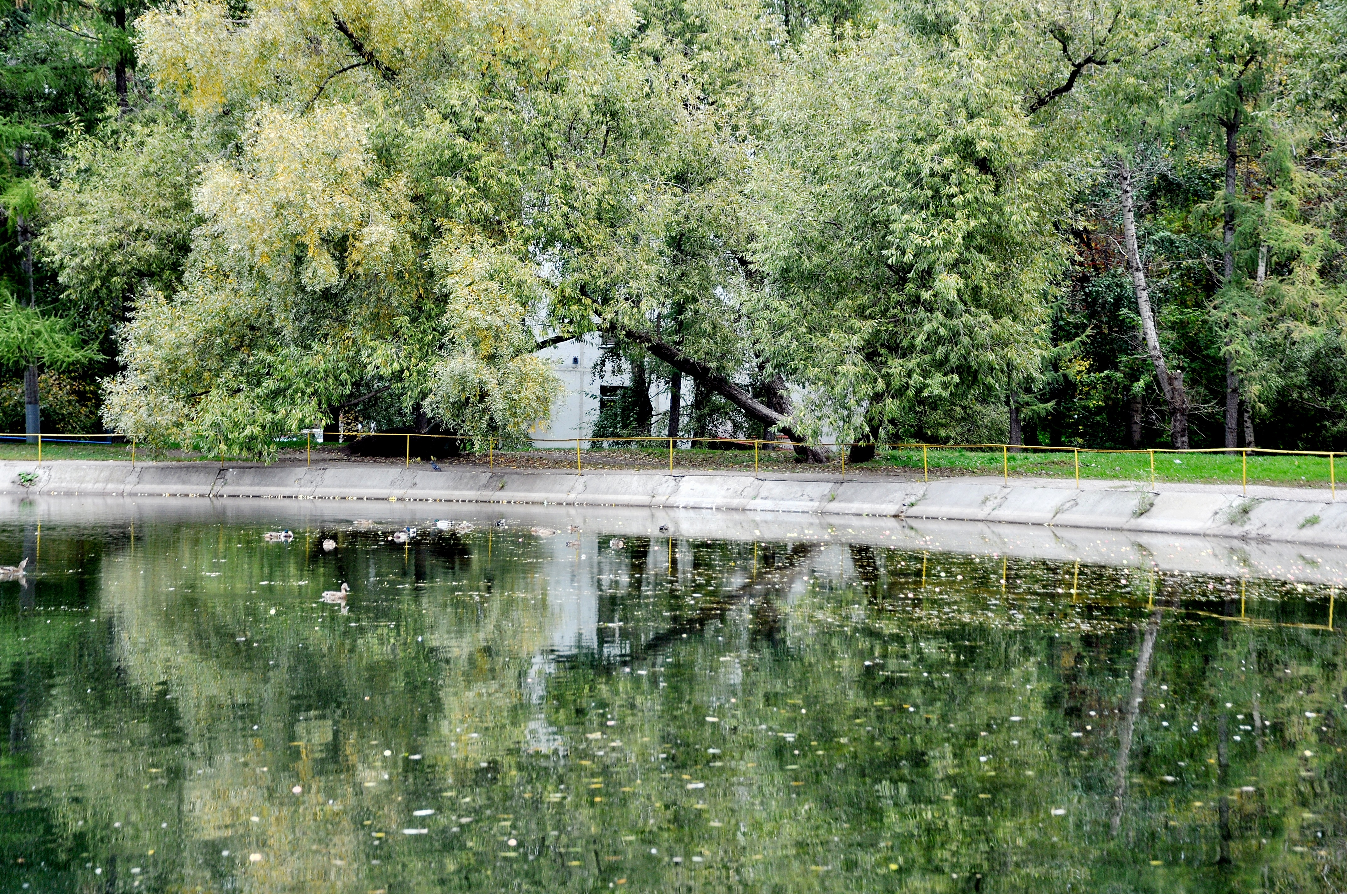 Пруд на Керченской улице (Нижний Перекопский пруд). Вид на западный берег